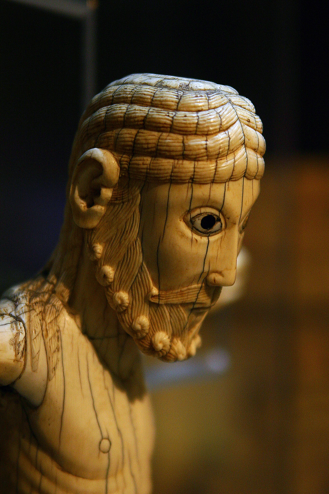 Cristo de Carrizo, una de las joyas del museo de León.